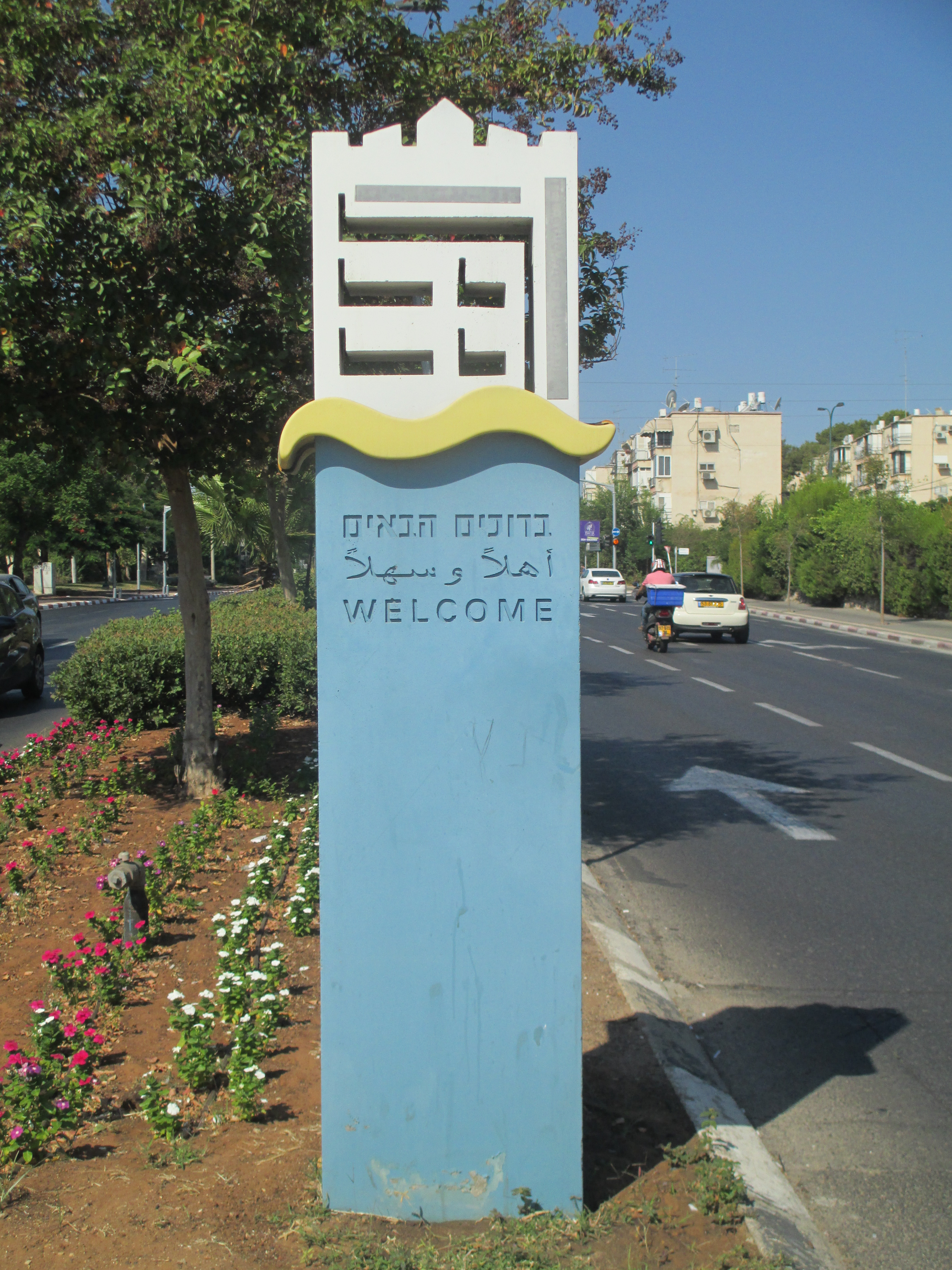 שלט של עיריית תל אביב בגבול המזרחי של תל אביב, במפגש בין דרך השלום בתל אביב לדרך אלוף שדה ברמת גן.